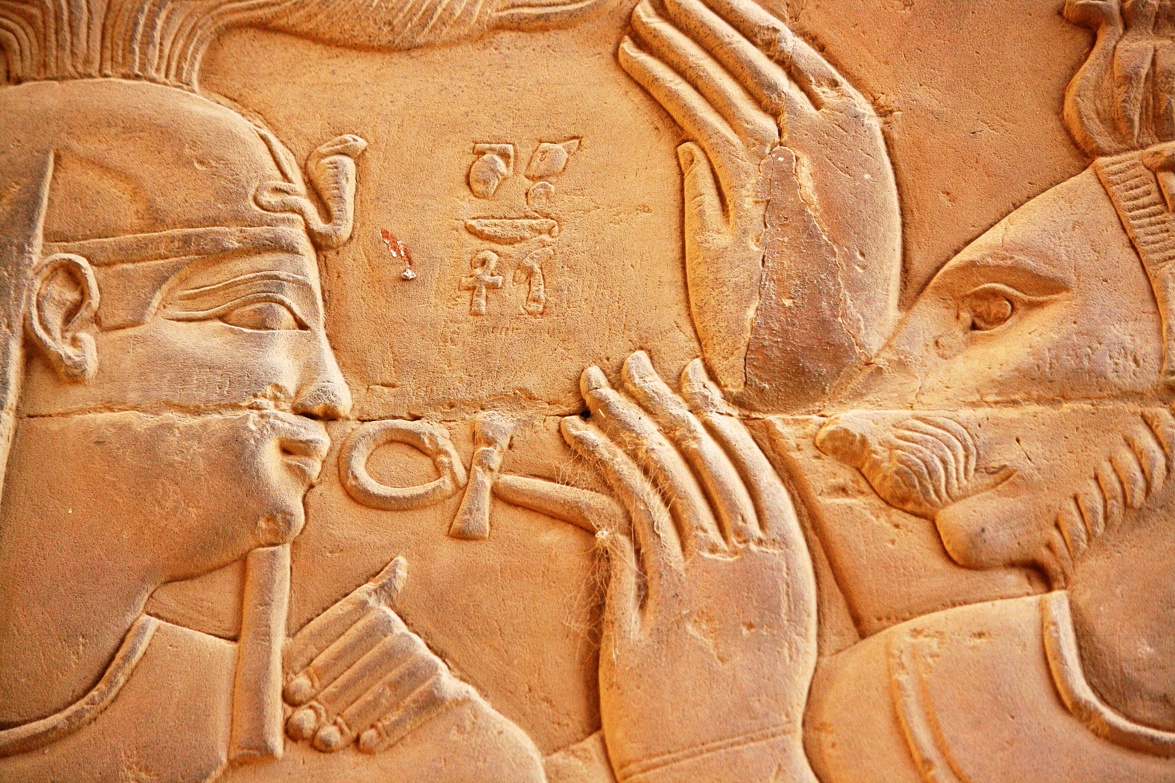 Tempel von Kom Ombo: Ankh - Weiterleben im Jenseits